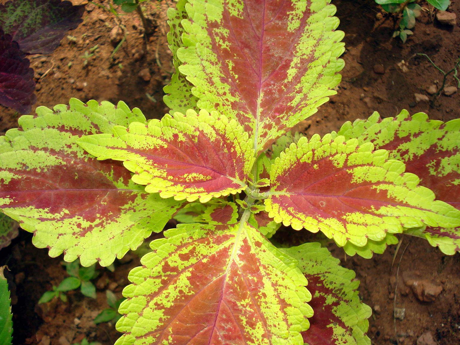 Leaves ഇലകൾ സസ്യങ്ങൾക്ക് പലതരത്തിലുള്ള ഇലകൾ ഉണ്ടാവുന്നു. ഇലകളിലെ 'ഹരിതകം’ സൂര്യപ്രകാശത്തിന്റെ സാന്നിധ്യത്തിൽ അന്നജം നിർമ്മിക്കുന്നു.